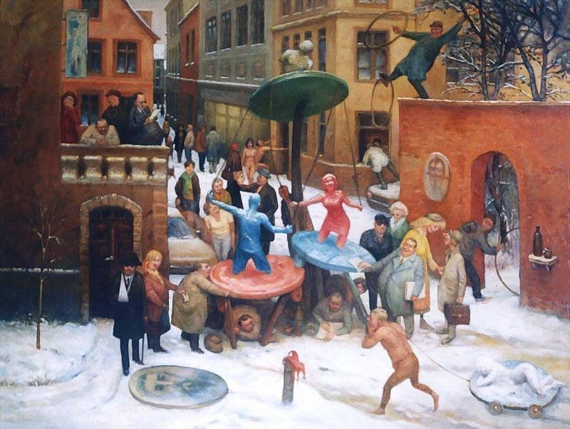 "Skolowani" - Jarosław Miklasiewicz Author: Jarosław Miklasiewicz